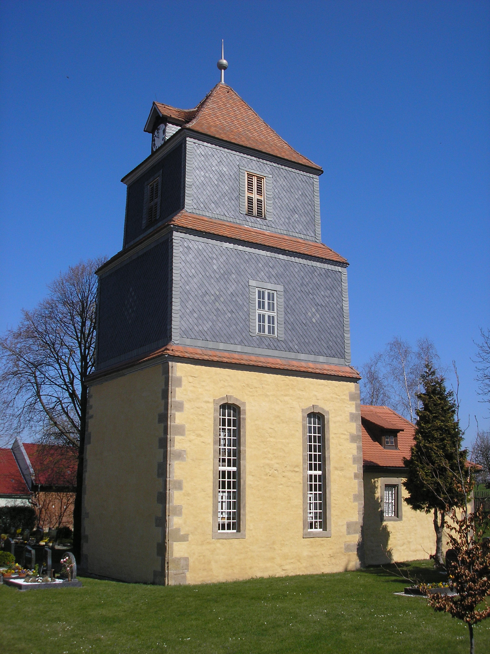 Die Kirche in Urbich bei Erfurt.